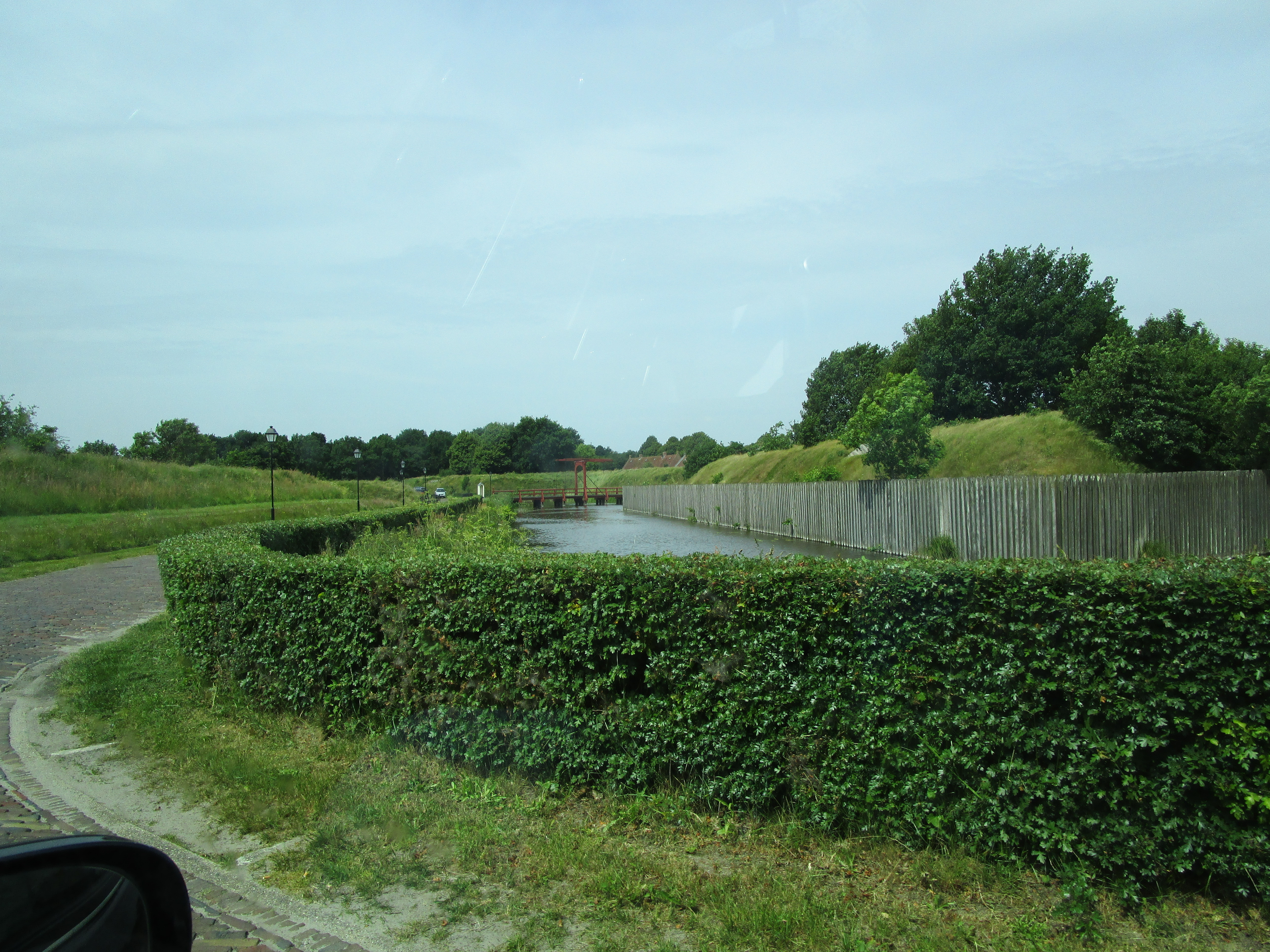 Ein altes Bollwerk an der Festung Bourtange in Holland